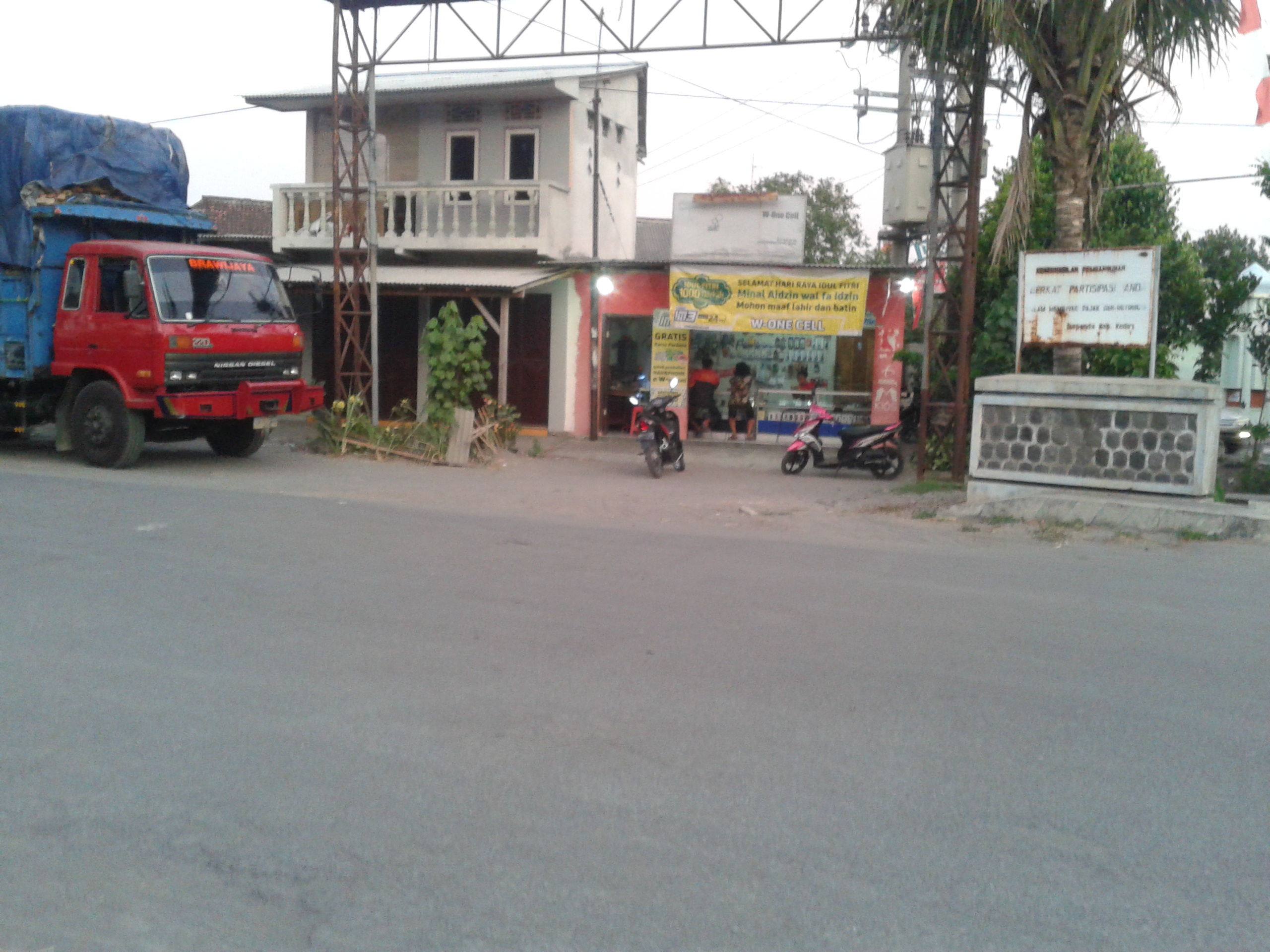 Bekas Halte Trem Gumul